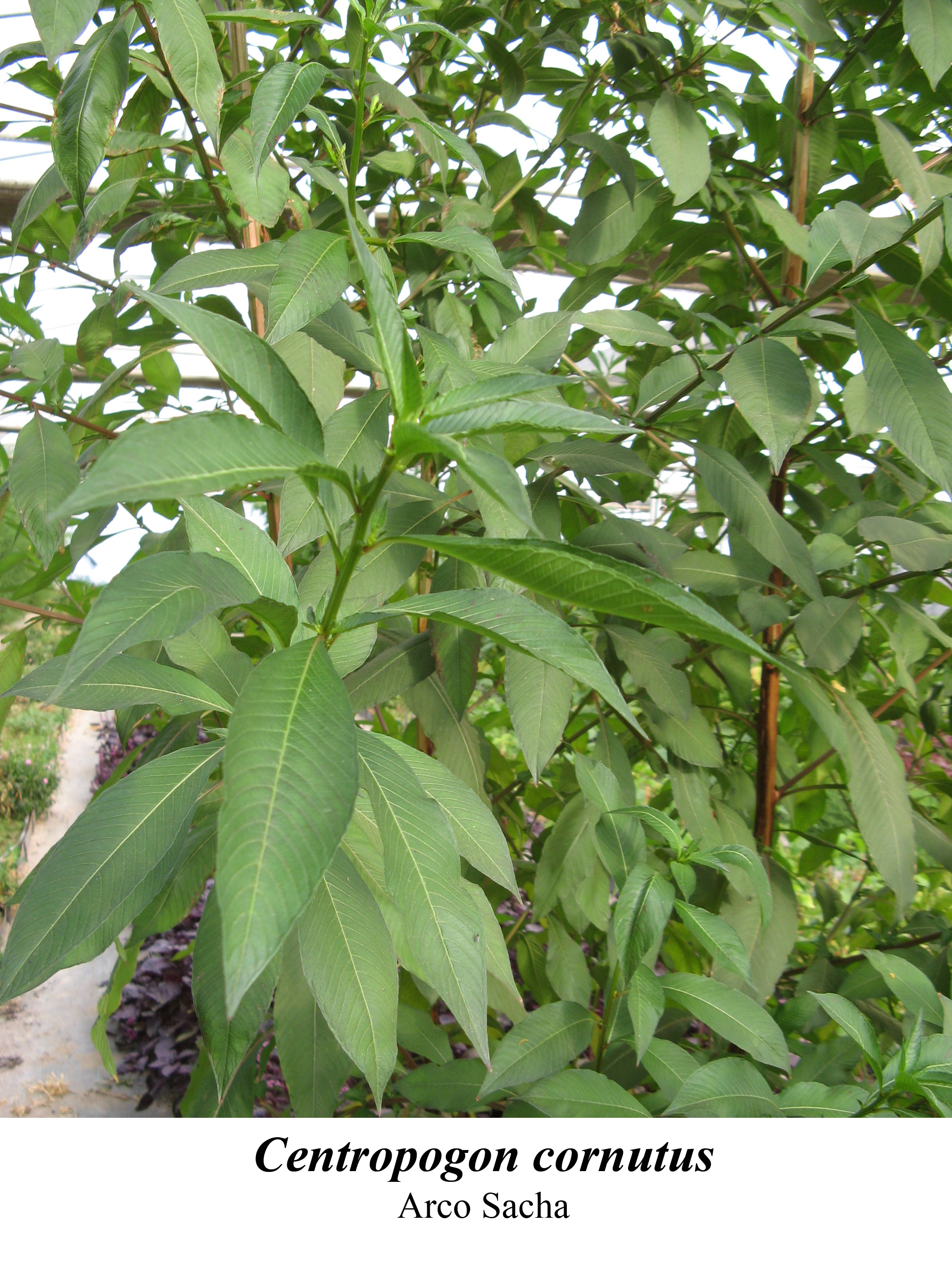 planta medicinal